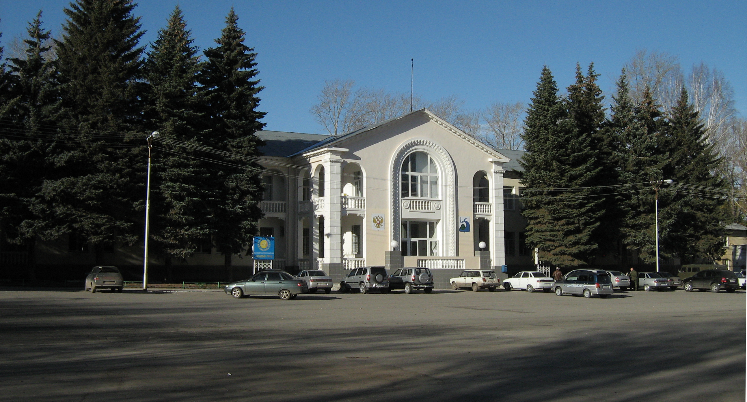 В здании НГДУ на втором этаже , офис 212 находится Жигулёвское отделение ЛДПР. Координатор - помощник депутата Губернской думы Енделадзе Вера Петровна.